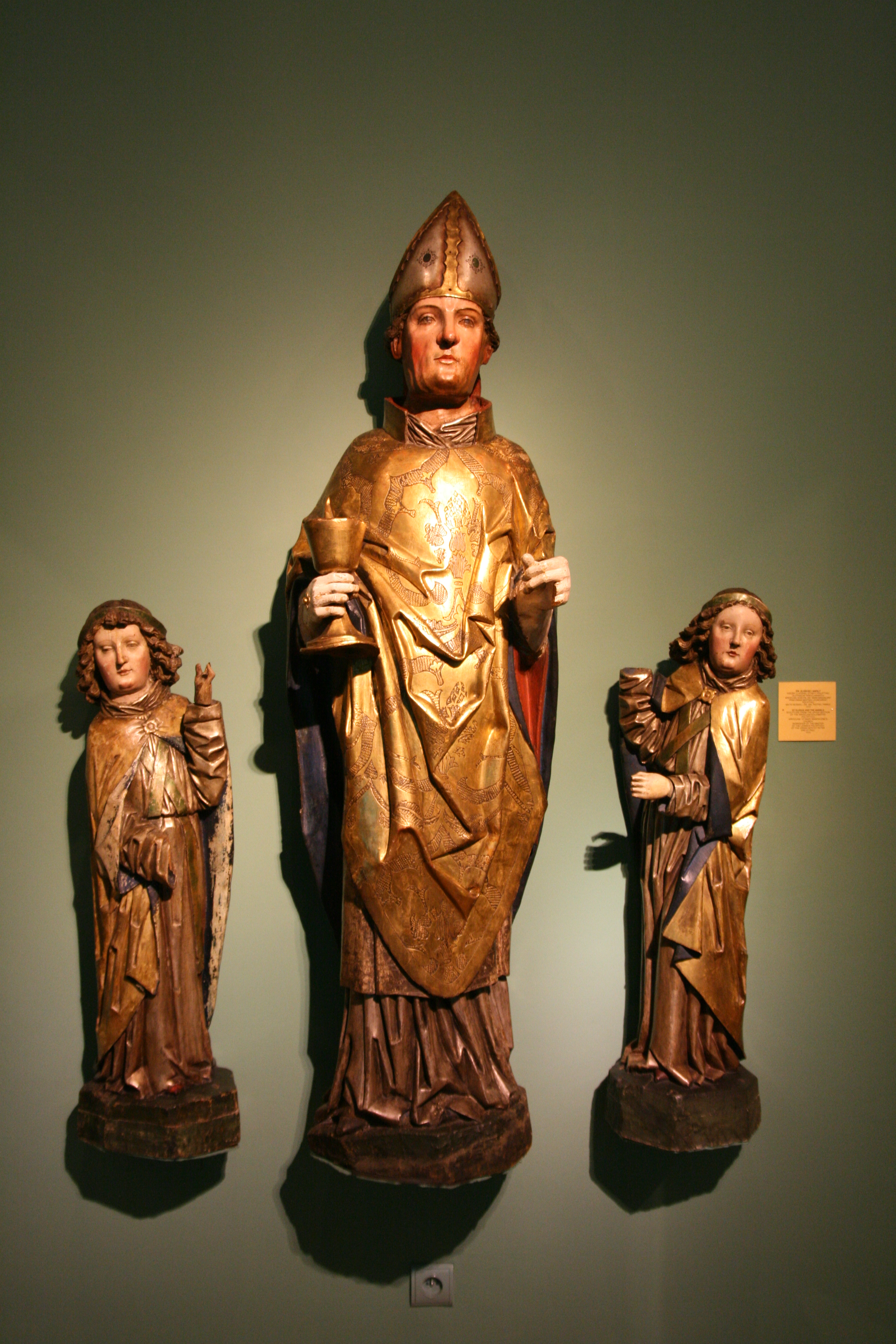 Rzeźby Św. Eligiusz i anioły eksponowane w Muzeum Narodowym we Wrocławiu. Rzeźby pochodzą z górnej strefy poliptyku złotników wrocławskich z kościoła Św. Marii Magdaleny.